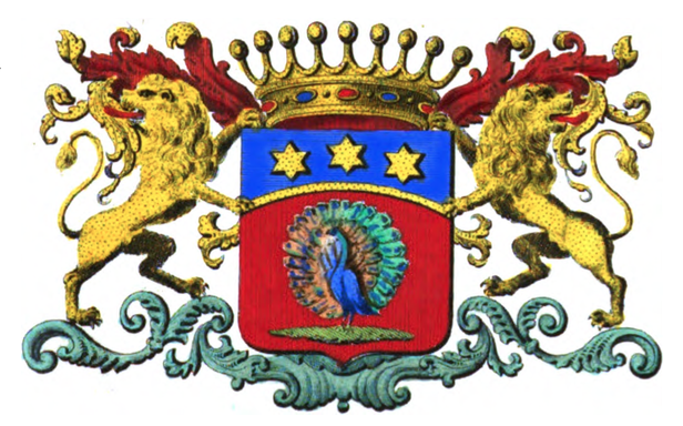 Armes de la famille d'Aldin